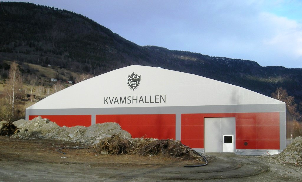 Kvamshallen på Kvam i Nord-Fron